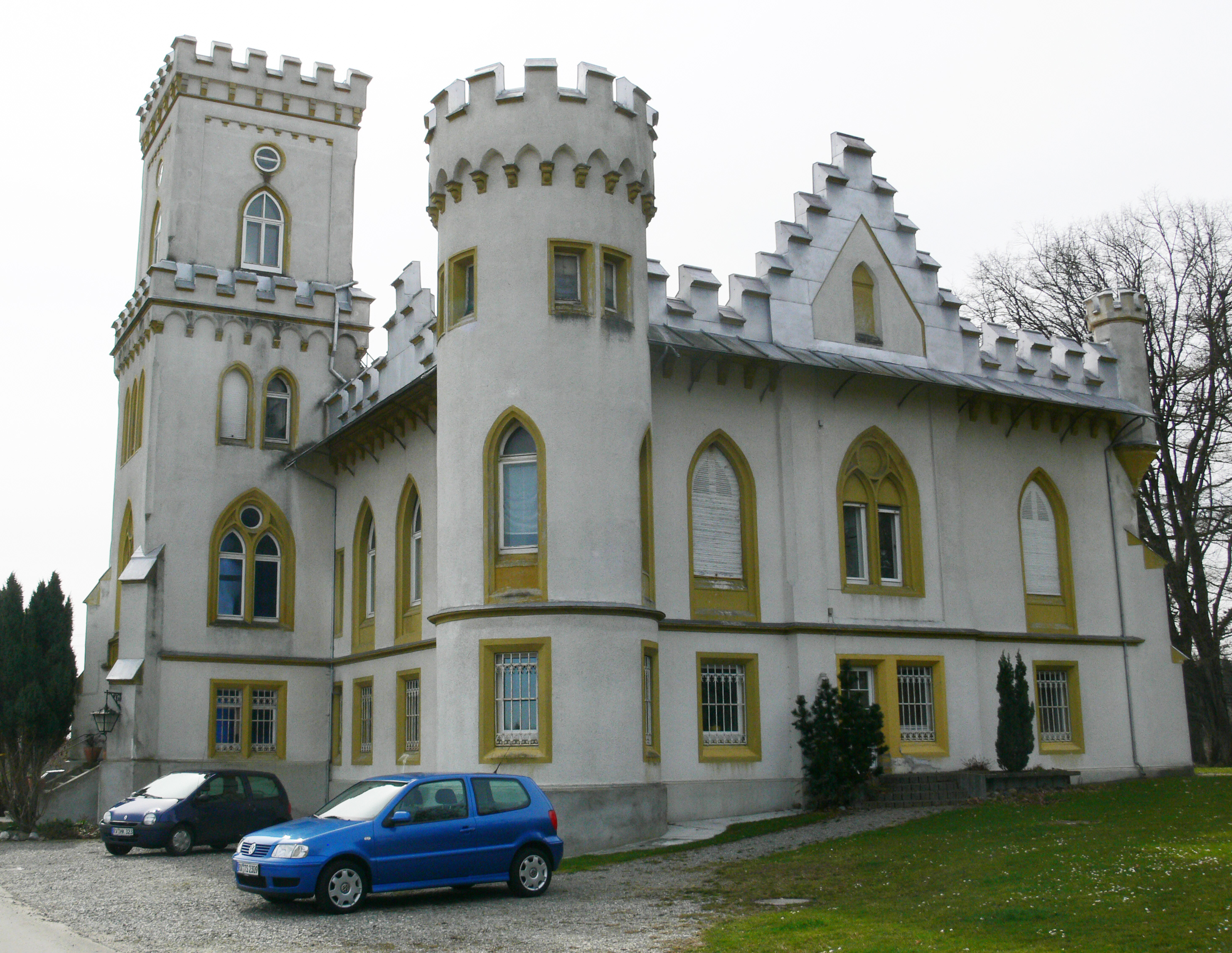 Schloss Benzenhofen, 88276 Berg, Landkreis Ravensburg